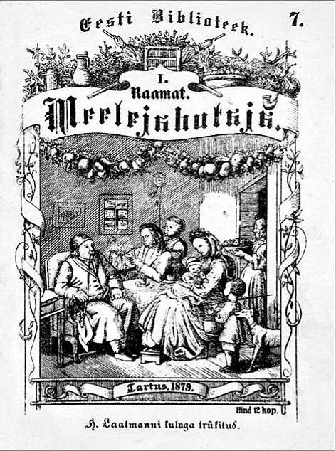 Meelejahutaja esikaas